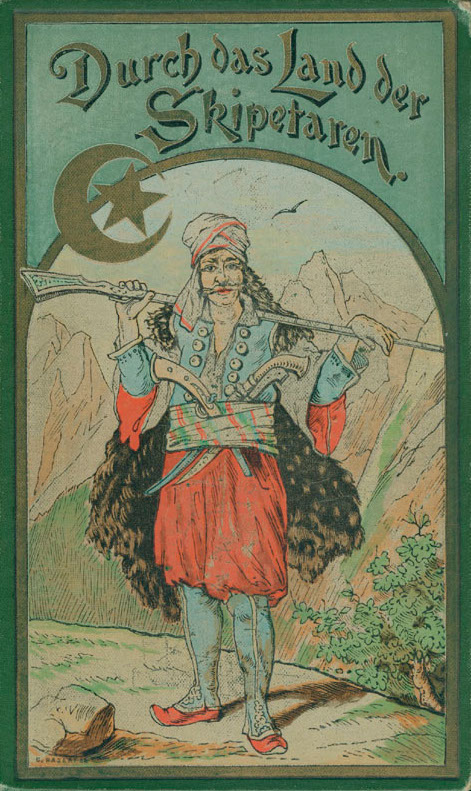 Buchdeckel der klassischen Ausgabe (1892 bis 1898) der Erzählung Durch das Land der Skipetaren von Karl May.